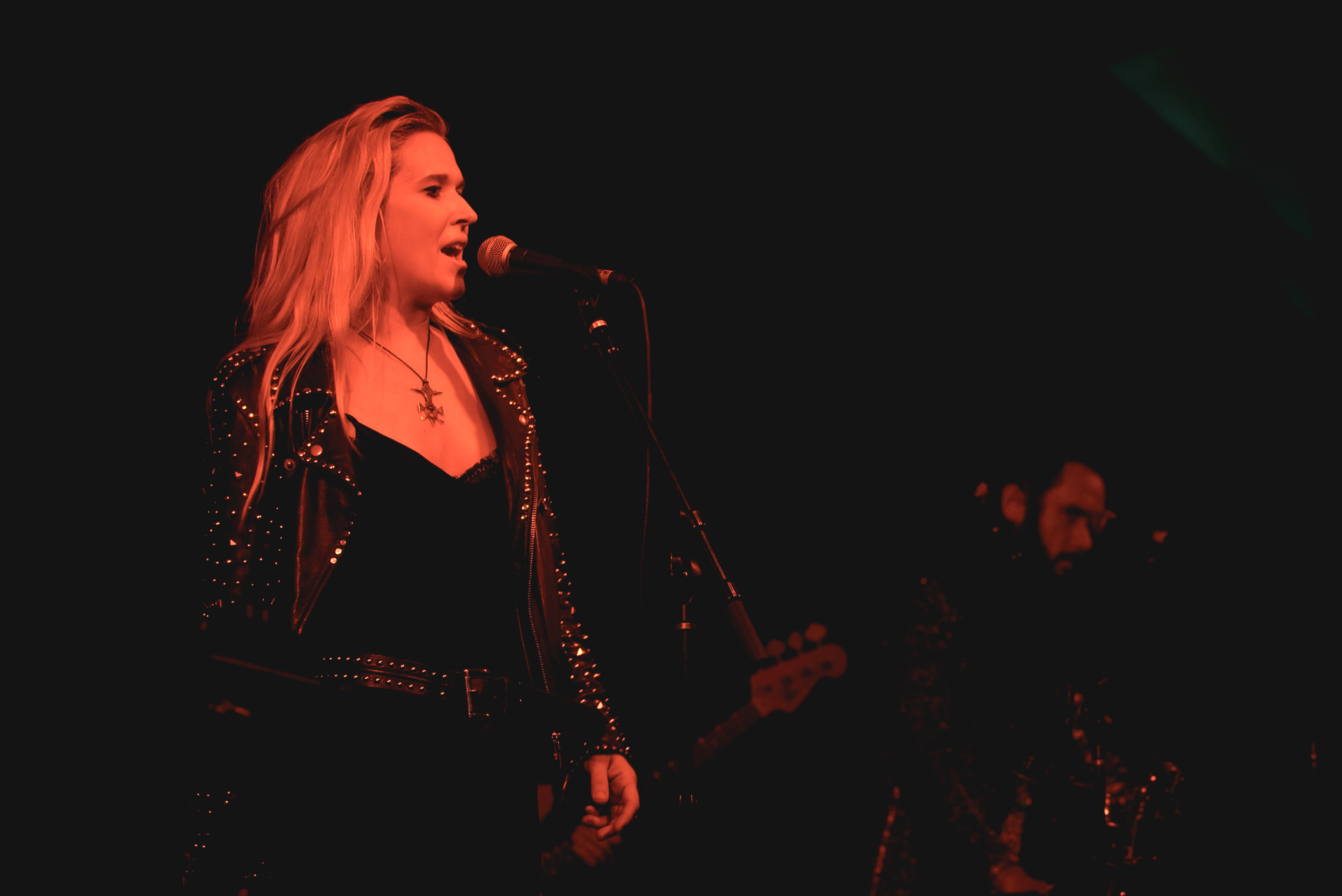 SXSW 2016 Day 2: Wild Belle